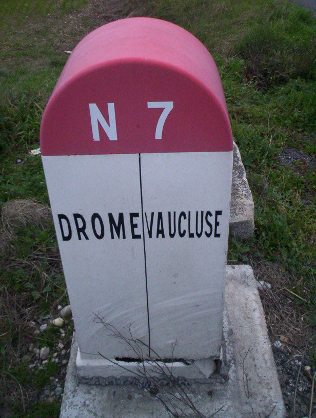 Borne de la nationale 7 séparant la frontière de la Drôme et du Vaucluse